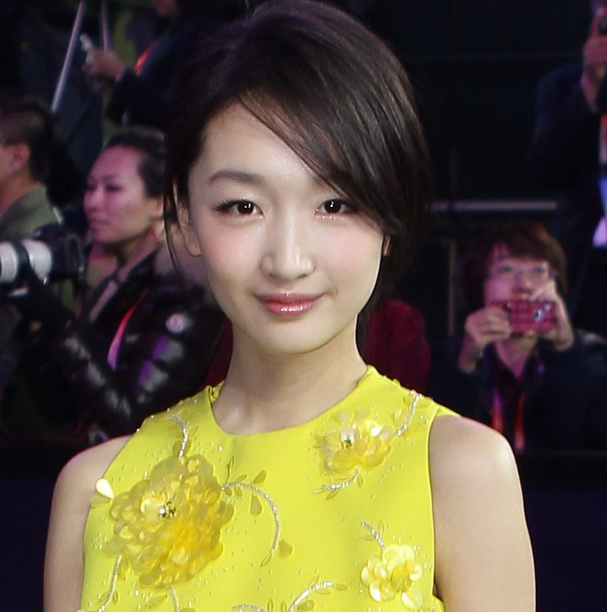 周冬雨在2013北京国际电影节闭幕式上